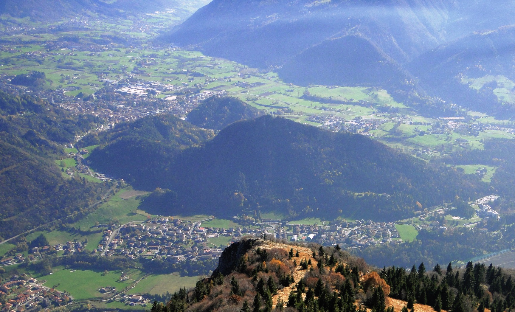 Panorama di Piario e Clusone (BG)